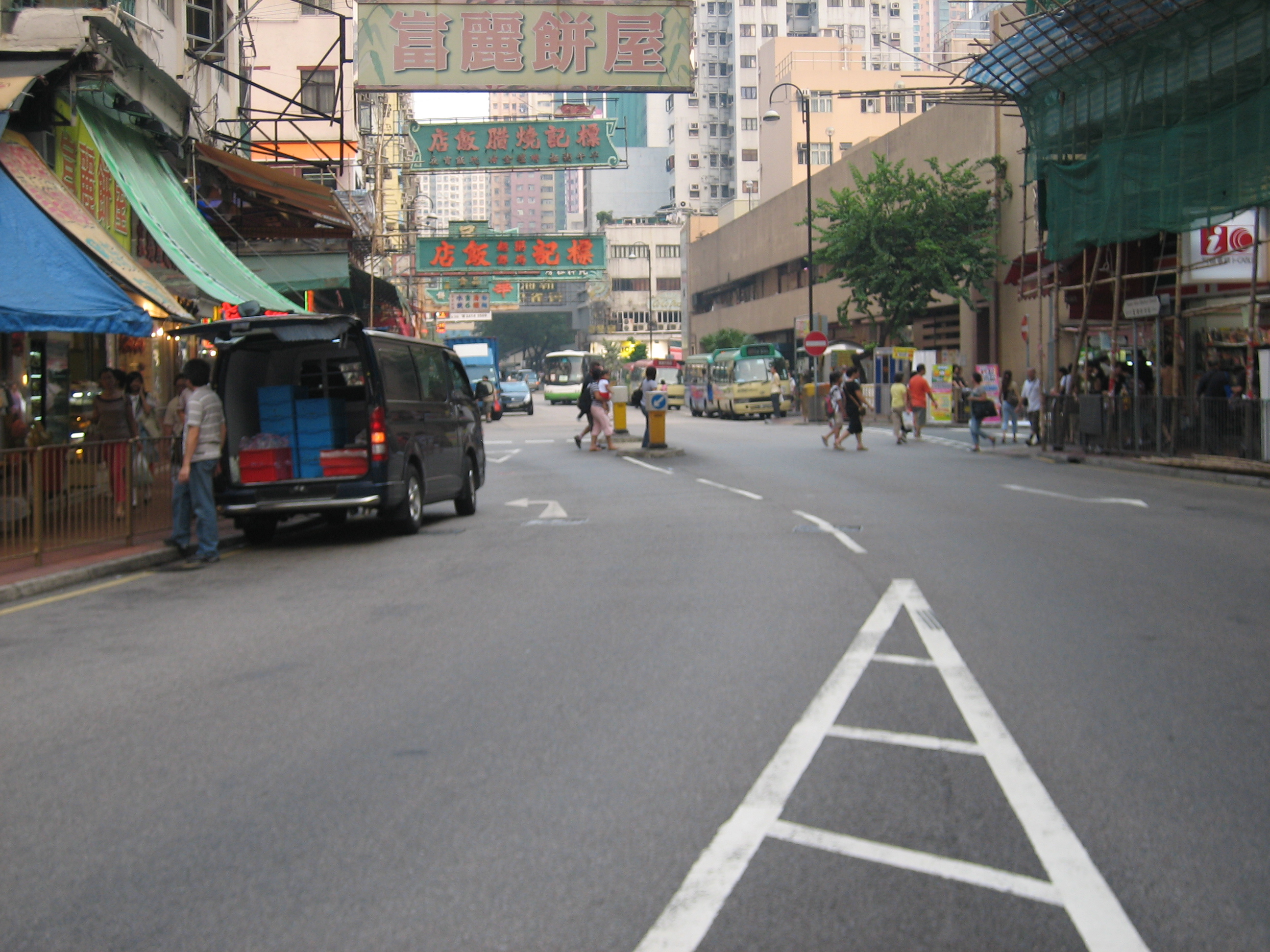 荃灣街市街